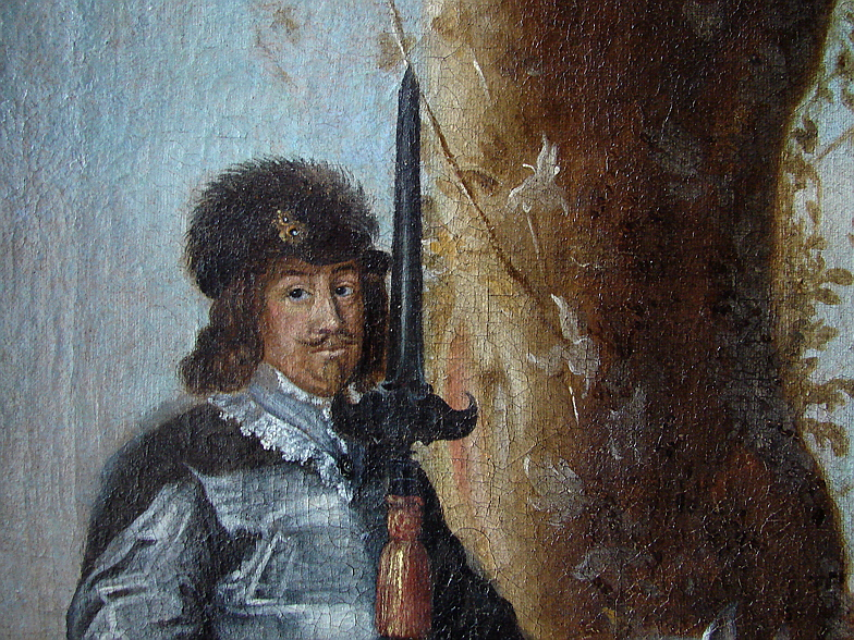 Den udvalgte prins Christian af Danmark og Norge (1603 -1647) ridende med Christian IV (detalje), tilskrevet Morten van Steenwinckel, Frederiksborg Slot, Hillerød, Sjælland